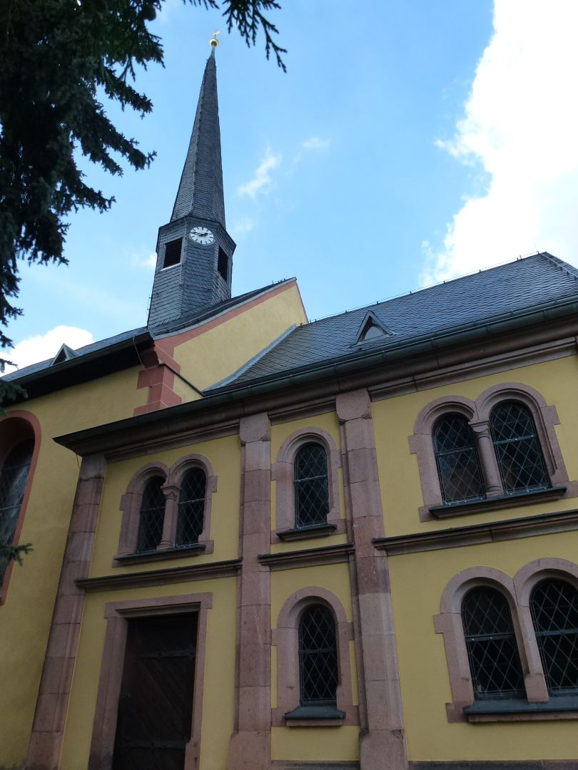 Kirche in Rochsburg